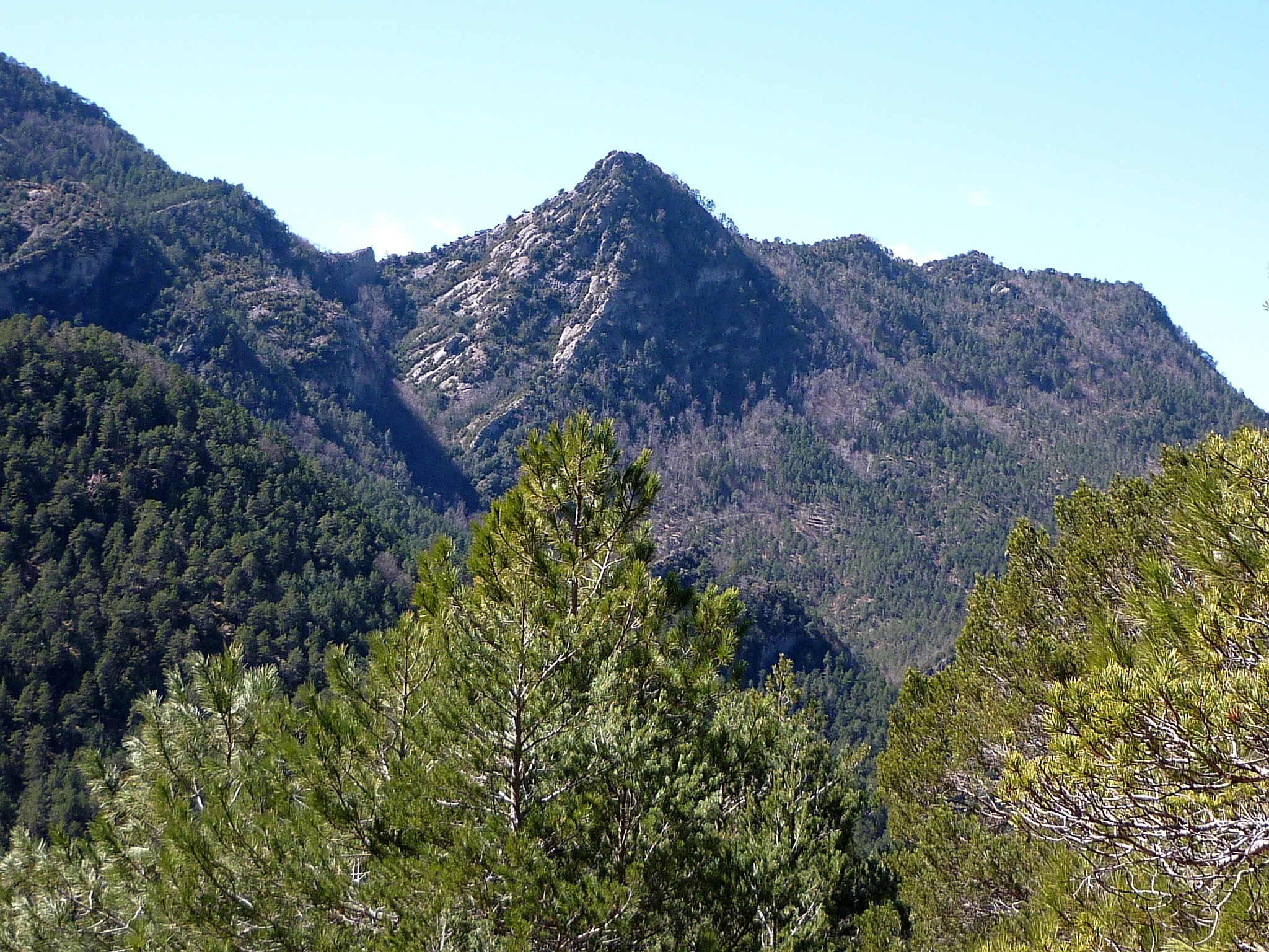 Obaga del Roc de les Monges, al Serrat de la Qüestió, des del Portell del Llop de Terçà. Navès (Solsonès - Catalunya)